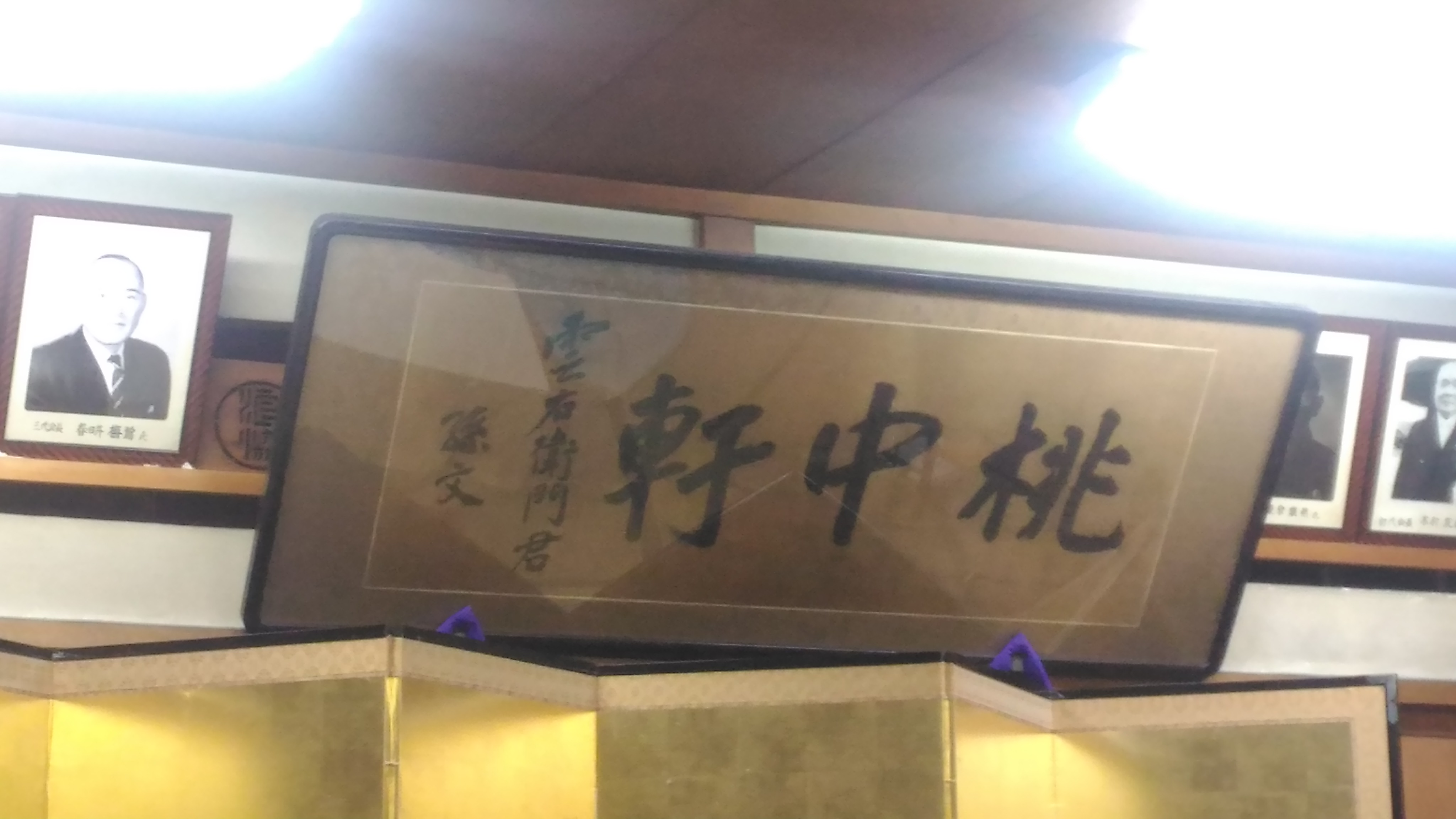 日本浪曲協会にある額「桃中軒雲右衛門君 孫文」。孫文筆。宮崎滔天から様々に渡り、寿々木米若から寄贈された。毎週火曜日に開いている「通う火曜亭」で撮影したもの。